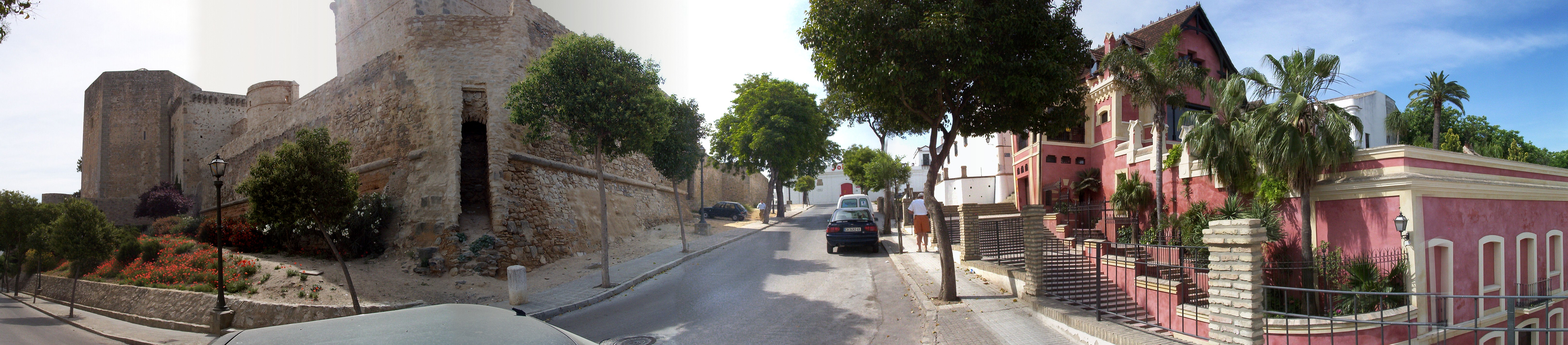 Castillo de Santiago (Sanlúcar de Barrameda, provincia de Cádiz, Andalucía).